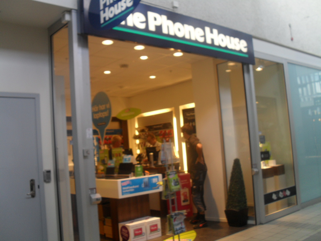 The Phone House